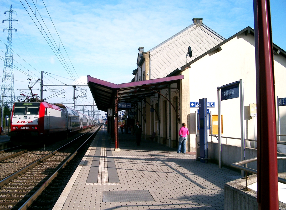 Sujet: Gare vu Rodange; Source: Eege Foto vum User:Pecalux; Datum: 03.11.2006